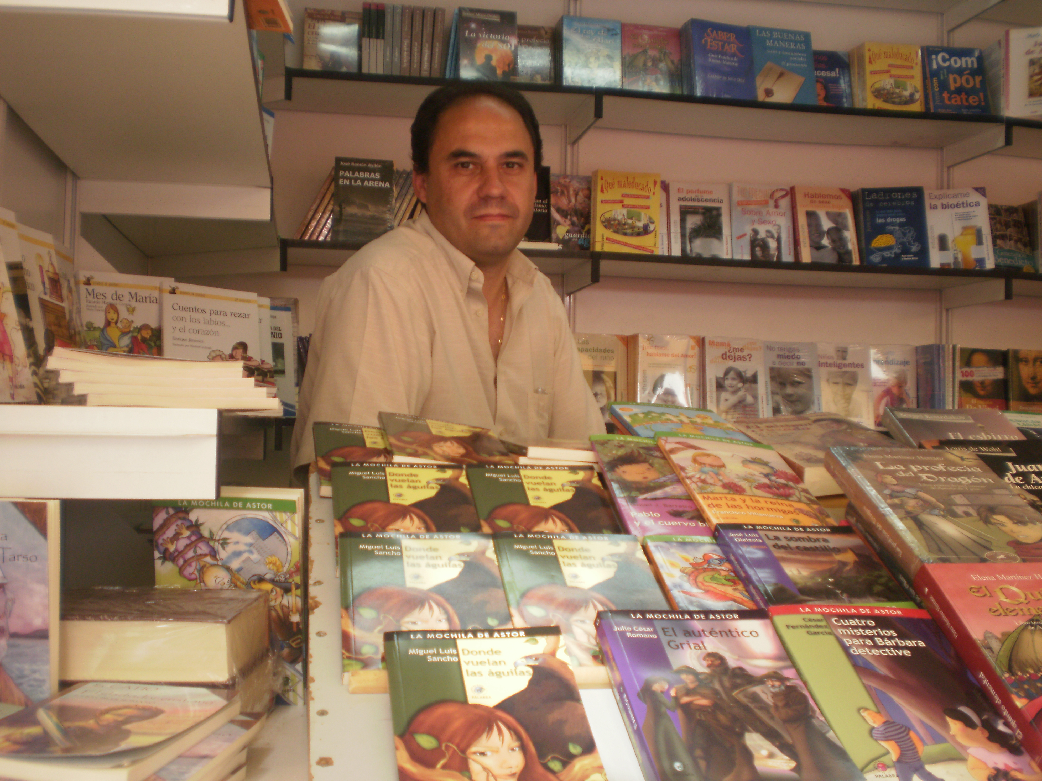 Instantánea del escritor de Literatura Infantil y Juvenil Miguel Luis Sancho, que posee un artículo en Wikipedia con el título "Miguel Luis Sancho".